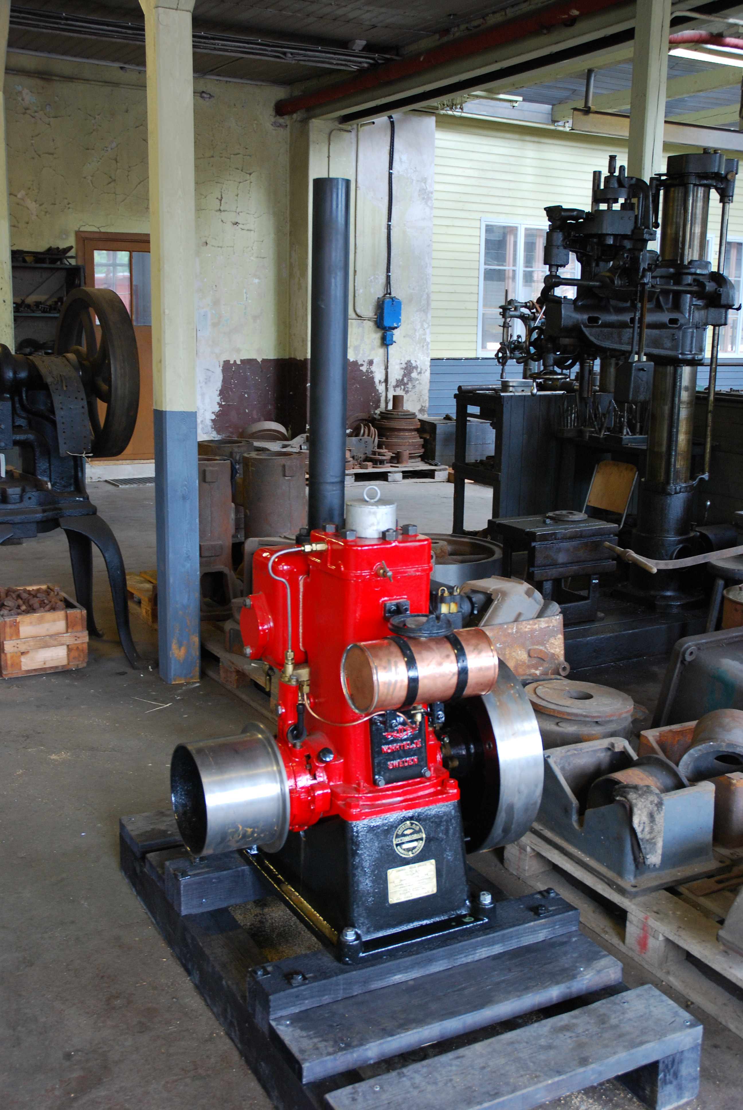 Drott tändkulemotor från motofabriken Pythagoras i Norrtälje. Motorn är nytillverkad efter originalritningar.